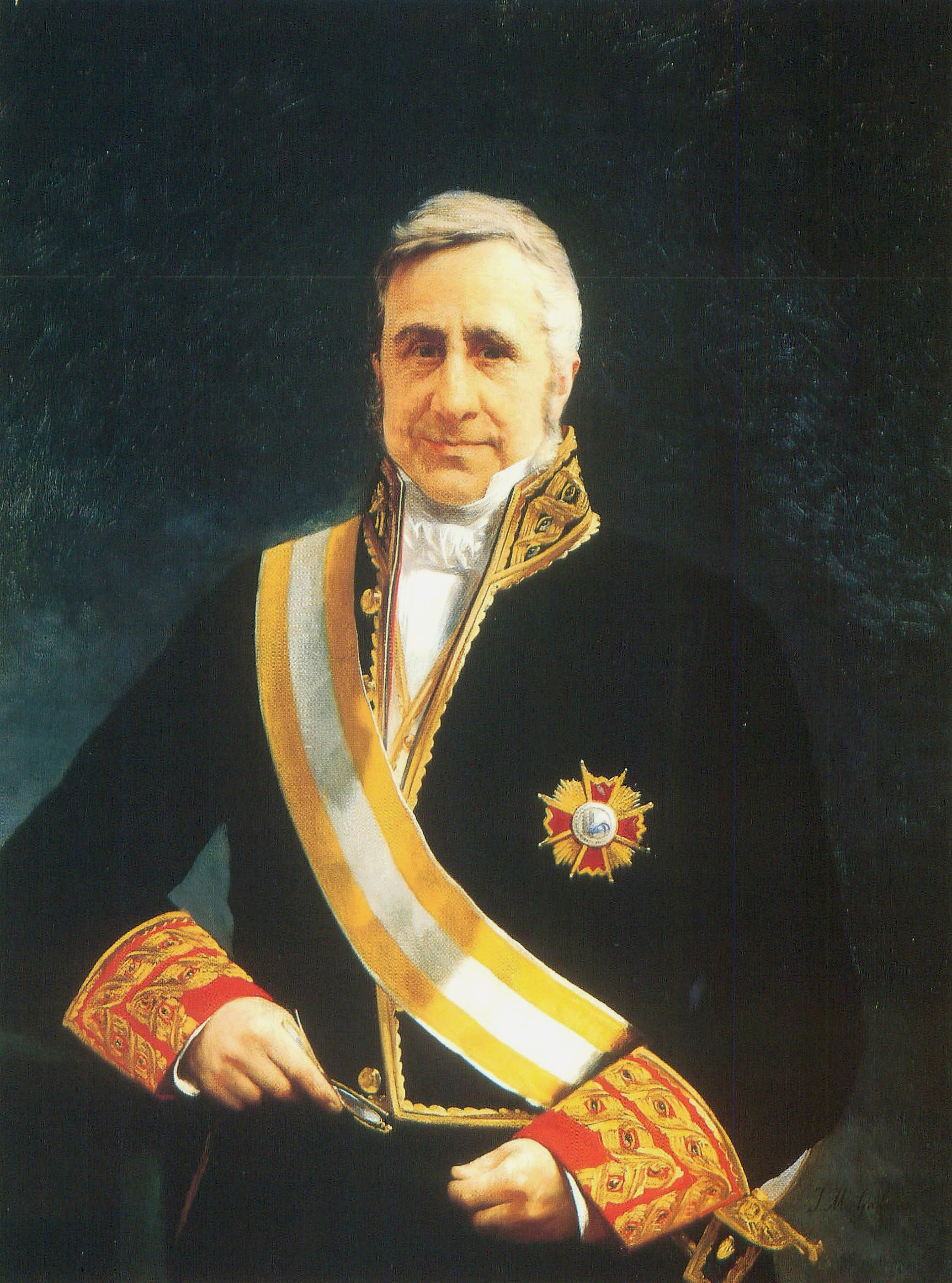 Retrato del político y diplomático español Mauricio Carlos de Onís (1790-1861), de orígen alemán. Fue ministro de Estado en varias ocasiones durante el reinado de Isabel II de España y también embajador de España en Londres y presidente del Senado de España. El retratado aparece luciendo la banda y la gran cruz de la Orden de Isabel la Católica.